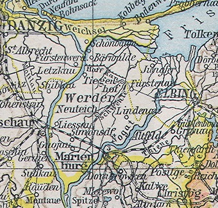 Kreis Marienburg in Westpreußen, Ausschnitt aus File:Ost-_und_Westpreussen.jpg